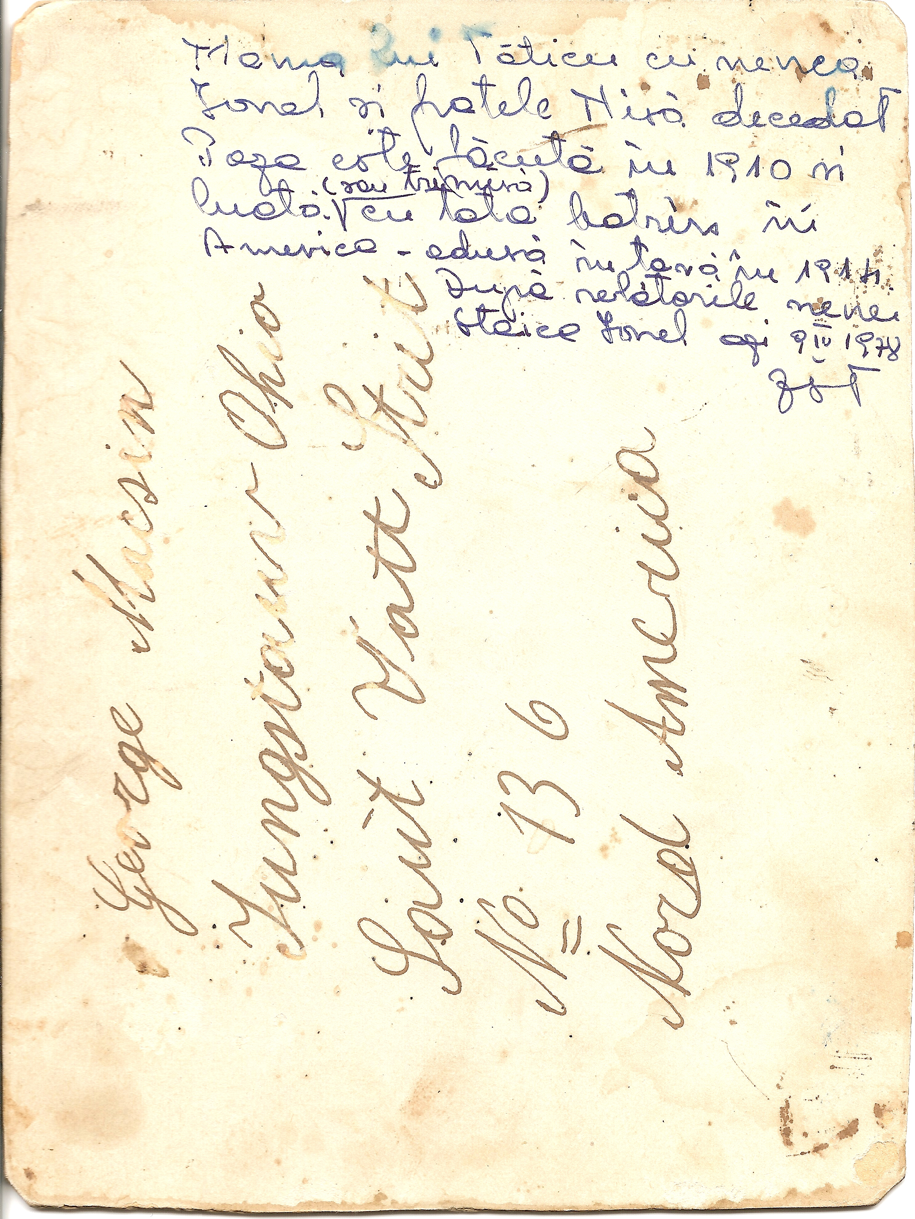 Verso la fotografia File:Ana lu Onu Pascului față.jpg Fotografie trimisă în anul 1910, în America, lui Gheorghe(George) Maxim, unul din fondatorii bisericii "Sfânta Elena" din Cleveland.